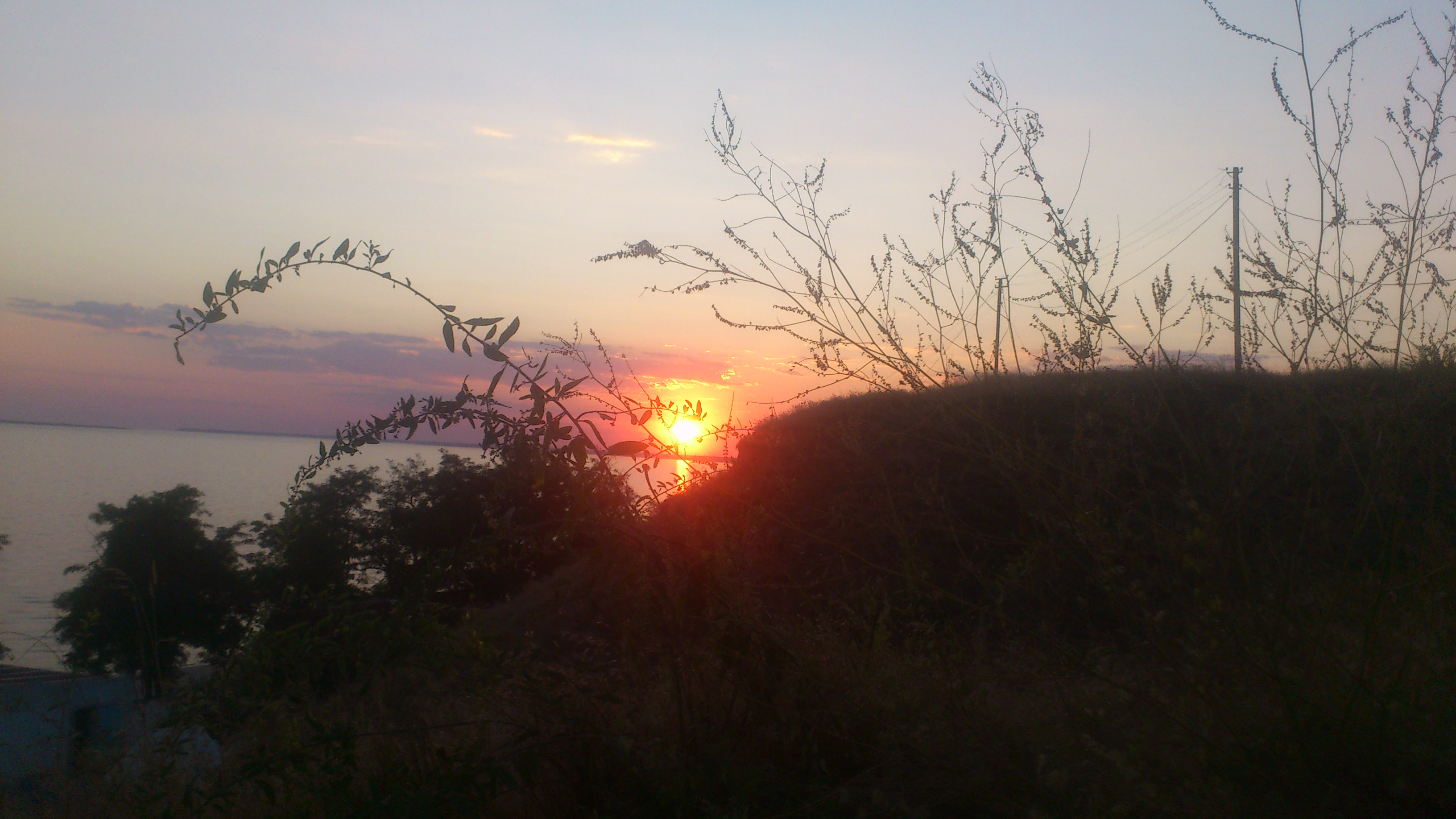 Захід сонця в Очакові